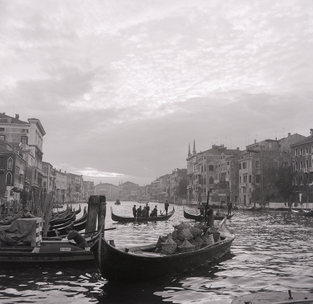 Serie fotografica : Venezia, 1965 / Paolo Monti. - Buste: 19, Fototipi: 19 : Negativo b/n, gelatina bromuro d'argento/ pellicola ; 6x6, 6x9. - ((Serie costituita da 19 buste di negativi identificati con i nn.: 6661, 6662, 6663, 6664, 6665, 6666, 6667, 6668, 6669, 6670, 6671, 6672, 6673, 6674, 6675, 6676, 6677, 6678, 6679, 6680. e tenute insieme da una graffetta. - La busta identificata con il n. 6662 contiene un negativo, riproduzione di una stampa. - Meme (o Mariel, Maria Elvira Cocquio) era la nipote di Paolo Monti, figlia del pittore Carlo Cocquio, amico e cognato di Monti.